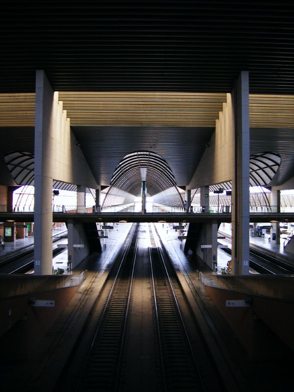 Vías de la estación de ferrocarril Santa Justa (Sevilla).